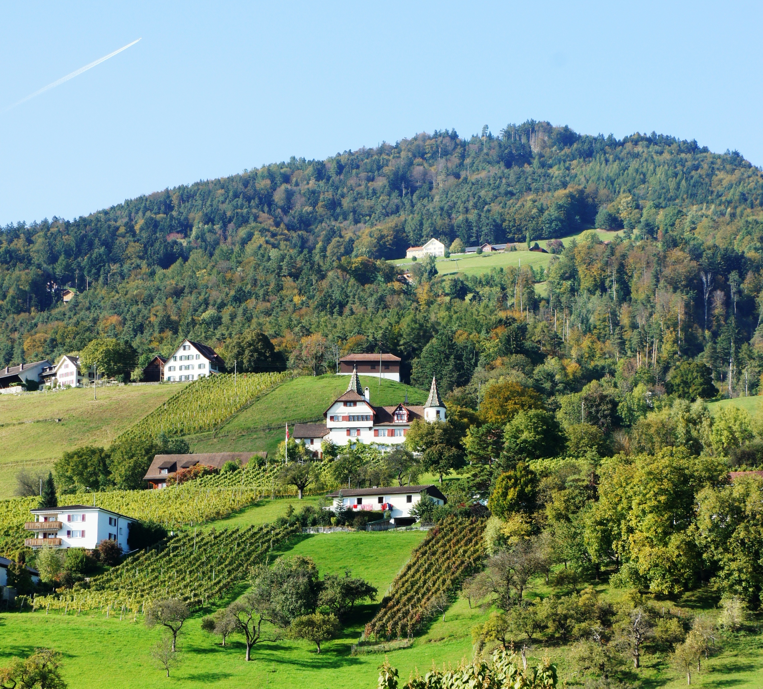 Etwas oberhalb und zwischen Marbach SG und Rebstein steht mitten in den Rebbergen das Schloss Weinstein. Blick aus Südosten.